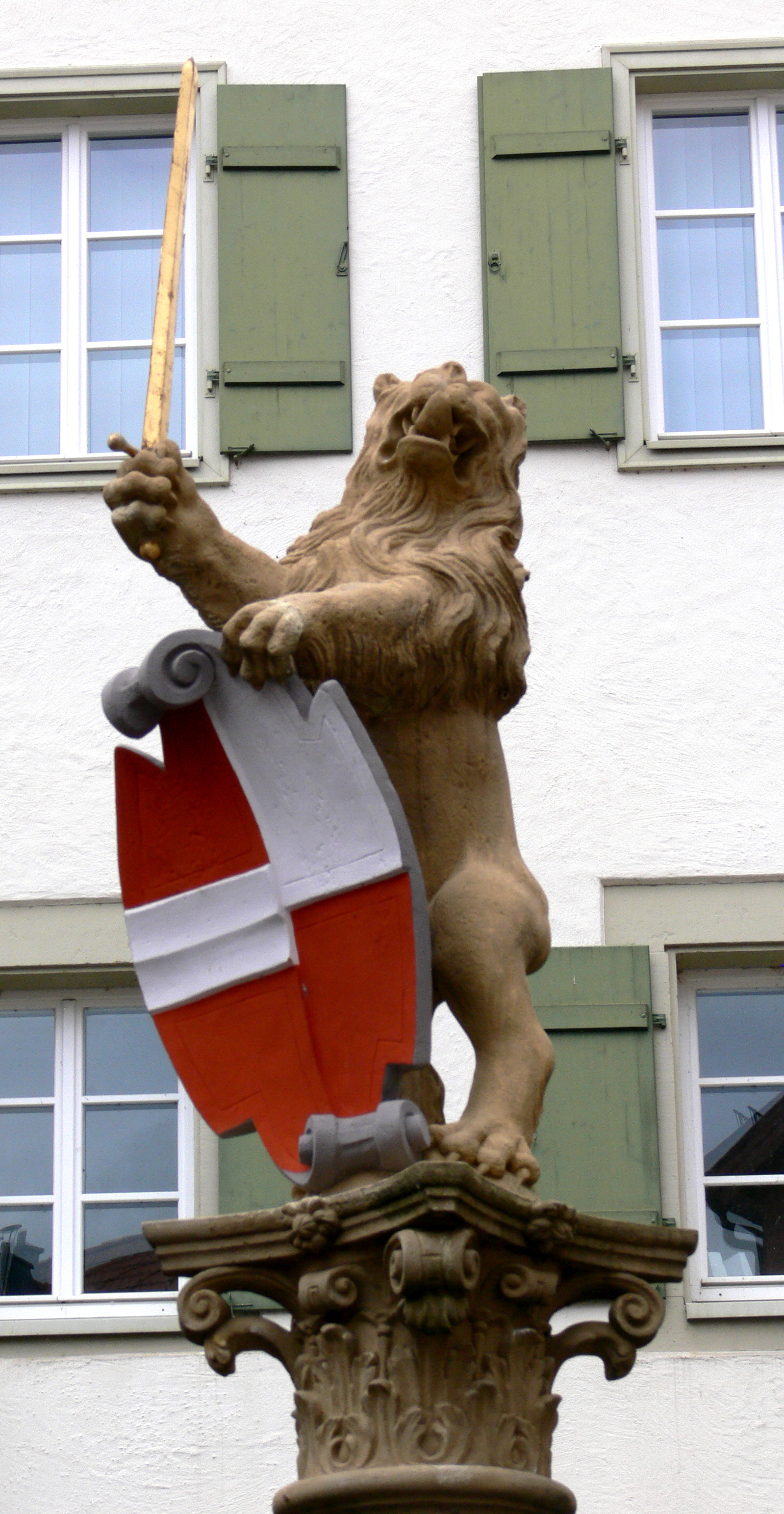 Horb am Neckar Marktbrunnen, Figur des. habsburgischen Löwen, Wappenschild geteilt mit habsburgischem und hohenbergischem Wappen